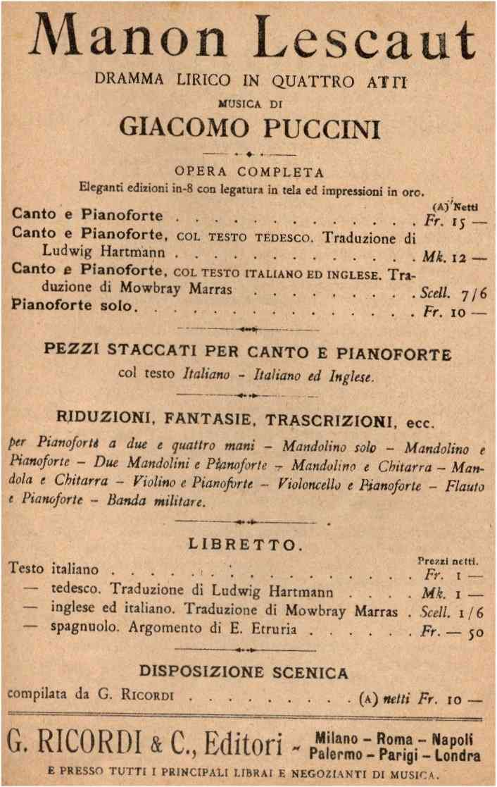 libretto Manon Lescaut dramma lirico in 4 atti musica di Giacomo Puccini - pagina dei prezzi dell'opera completa